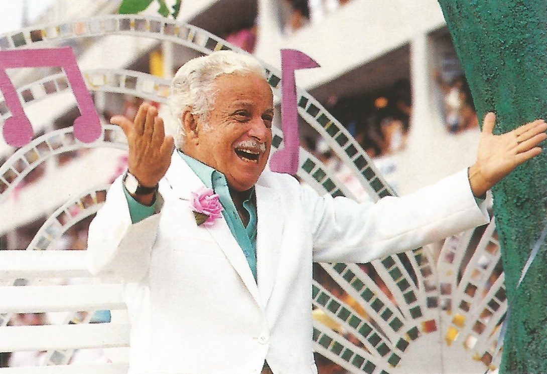 765_84u8jg894-10